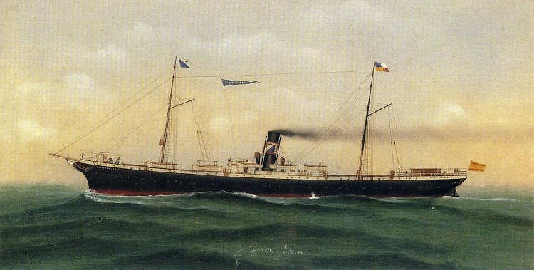 Acuarela y gouache sobre papel de L. Basteda. Año 1.903